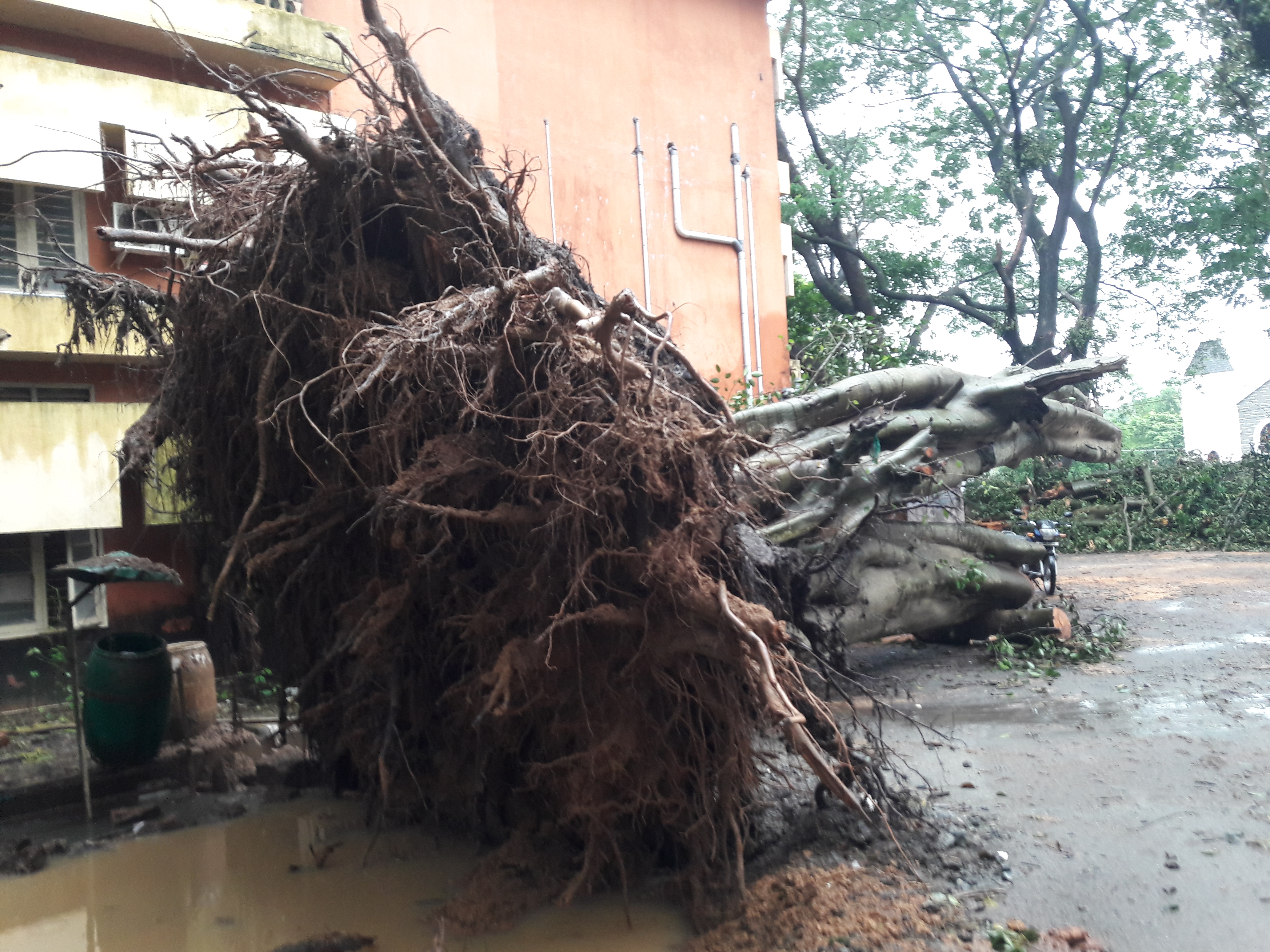 പാലക്കാട് കോടതി സമുച്ചയത്തില്‍ കാറ്റിലും മഴയത്തും കടപറഞ്ഞു വീണ ഒരു കൊയലി മരം / ചേല മരം.Indian bat tree / Indian bat fig.ശാസ്ത്രീയ നാമംFicus amplissima കുടുംബം Moraceae.